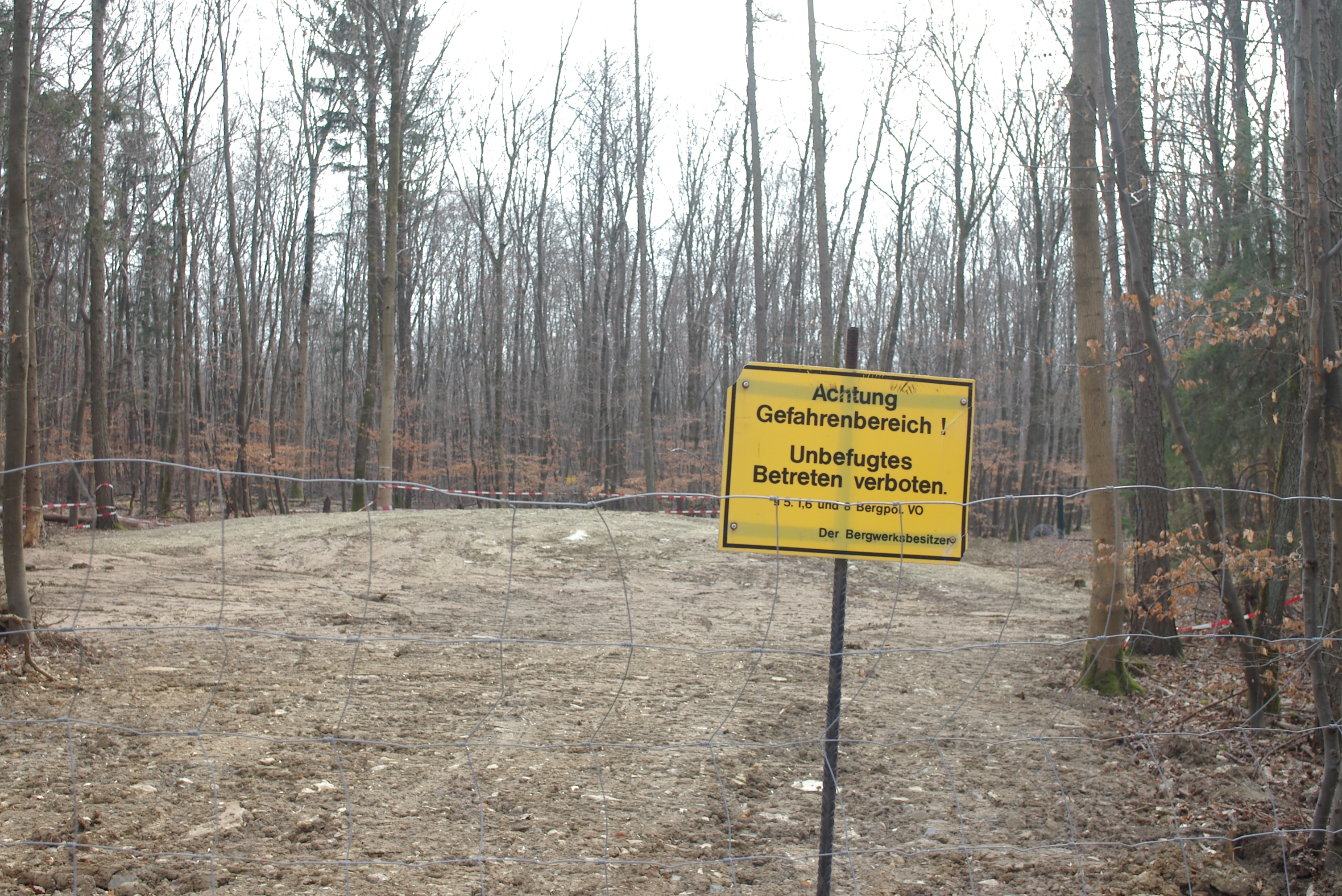 Folgen des Kalkabbaus unter dem Wehrholz